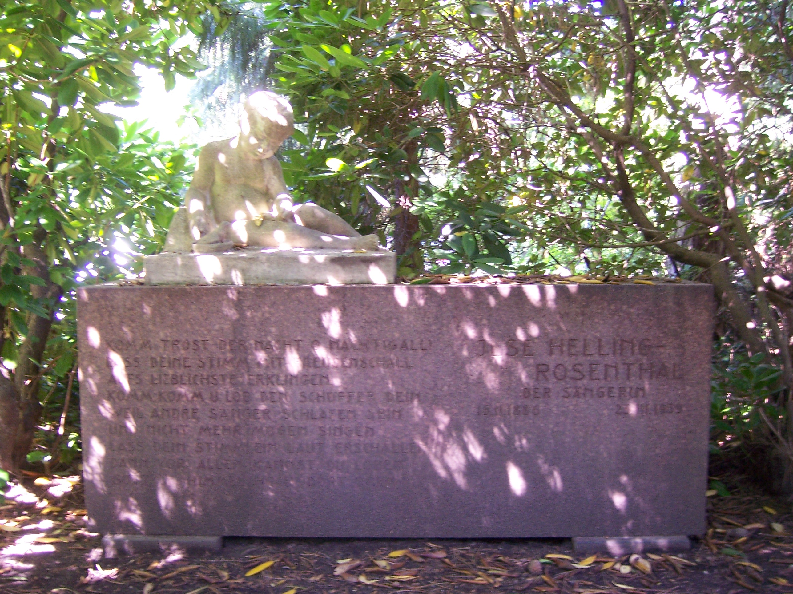 Grabmal Ilse Helling-Rosenthal